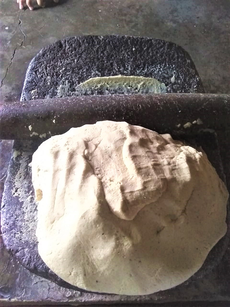 Masa de maíz sobre el metate en que fue molida en el pueblo mixteco de San Juan Achiutla, Oaxaca, México.